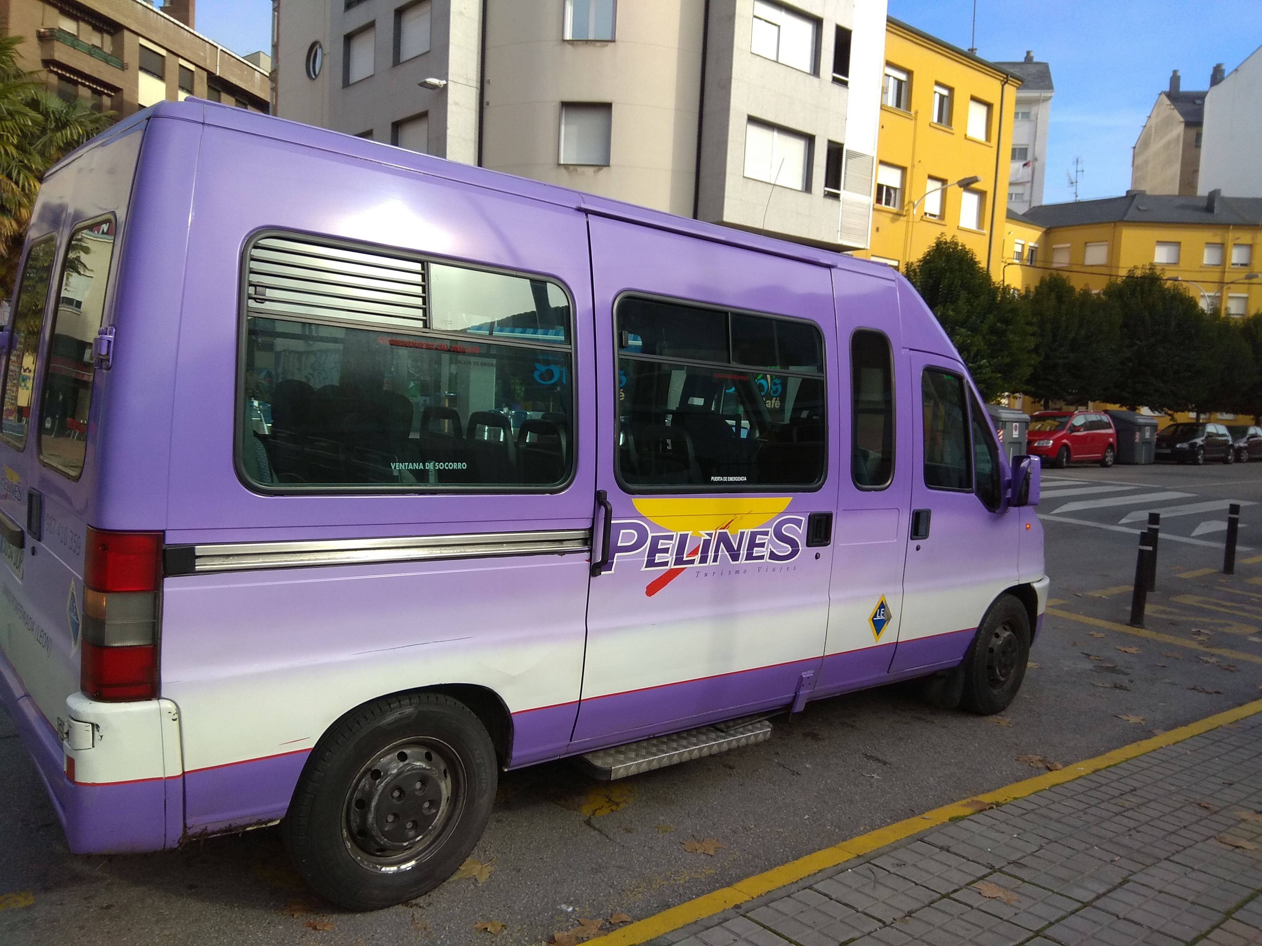 Imagen de un autocar que presta servicio en el Transporte a la Demanda de Ponferrada